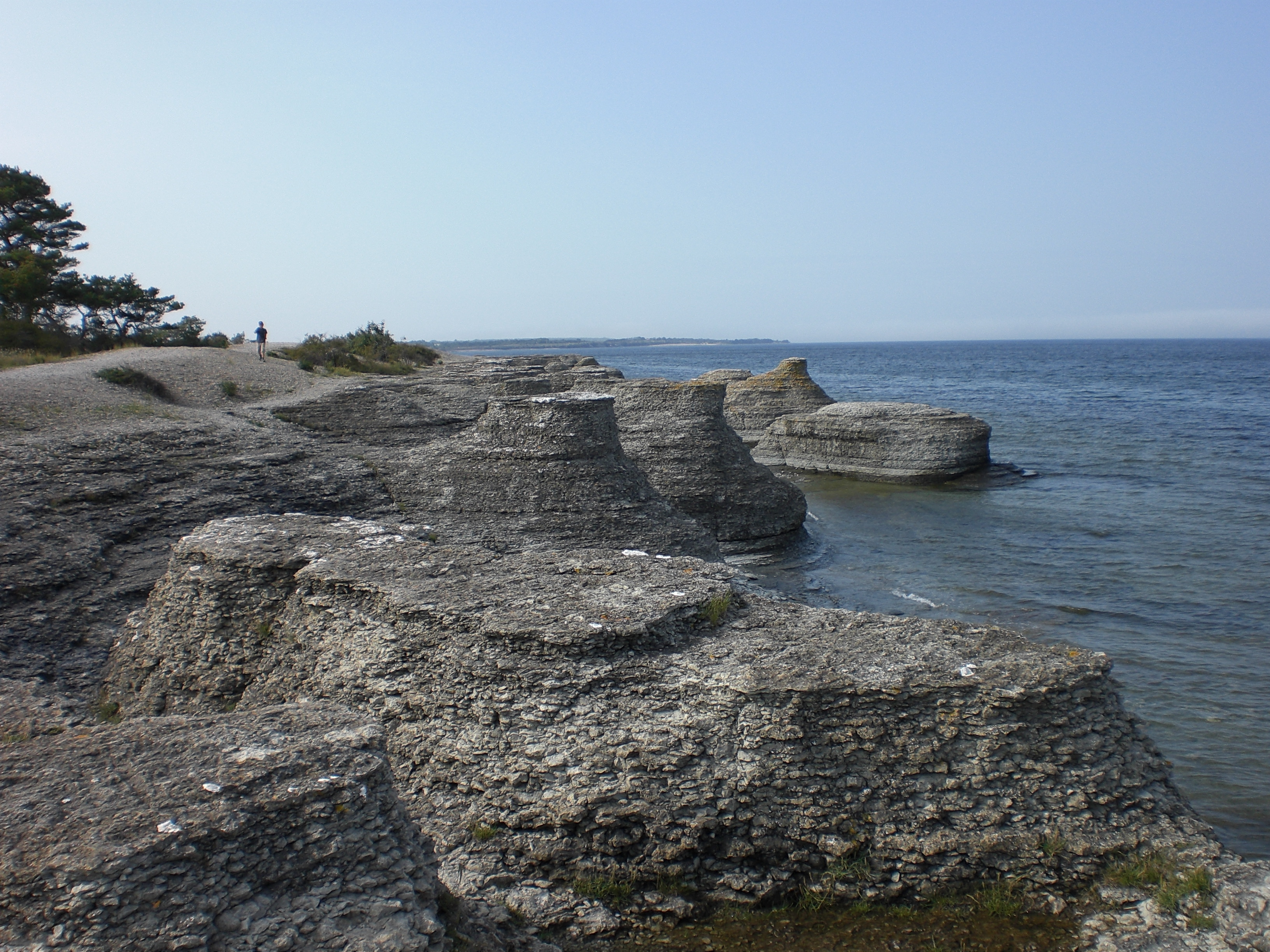 Raukensteine bei Byrum auf Öland, Schweden